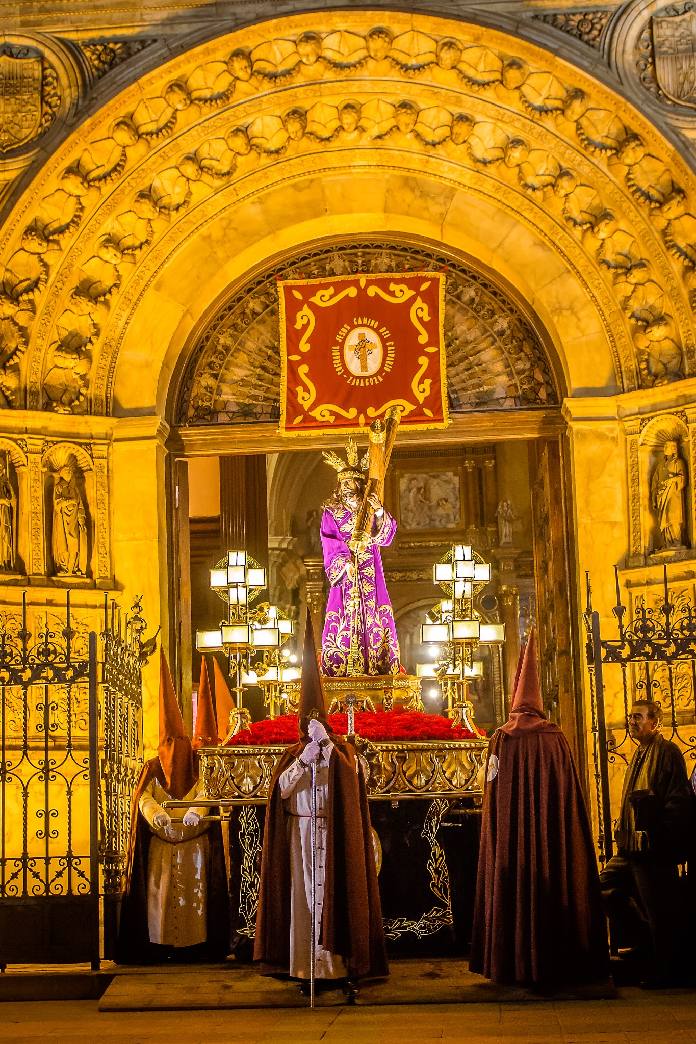 Paso de Jesús con la Cruz a Cuestas saliendo de Santa Engracia